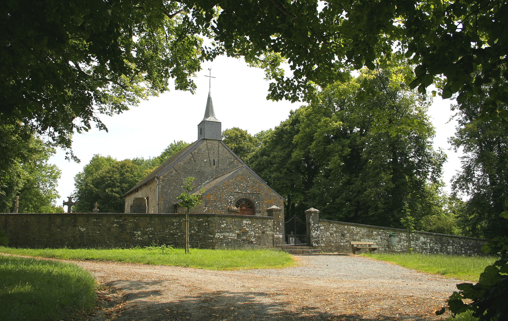 Matagne-la-Petite (Belgique), la chapelle romane Saint-Hilaire (XIIe siècle) ancienne église d'Ossogne, village déserté depuis le XVe siècle. Particularité: L'édifice est ceinturé d'une cinquantaine de tilleuls à petiites feuilles Tilia cordata dont les plus gros spécimens atteignent respectivement 260, 262, 278, 305 et 320cm de tour (à 1m50 du sol)